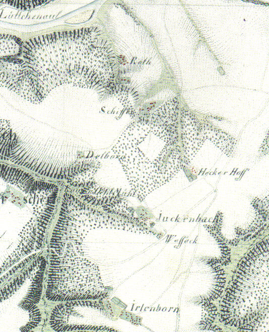 Landkarte des ehemaligen Gehöftes Delborn, heute Eitorf